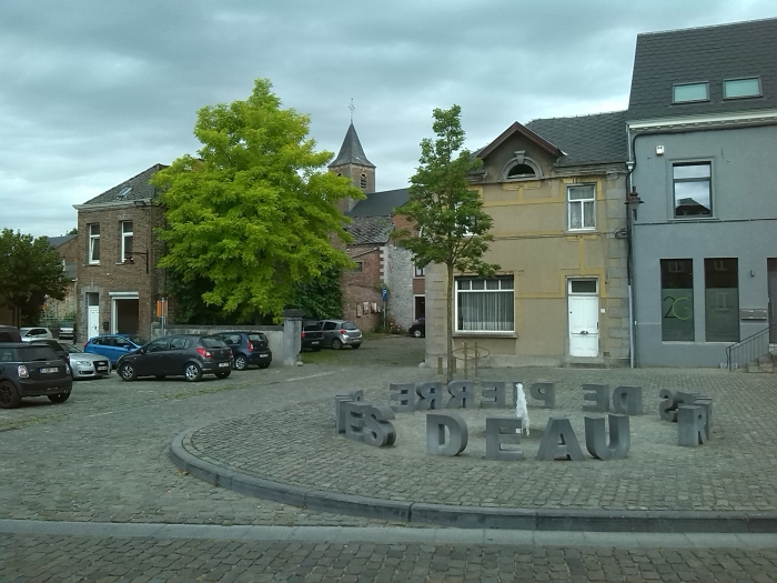 La fontaine "Rêve de pierre rêve d'eau" sise sur la Grand-Place.